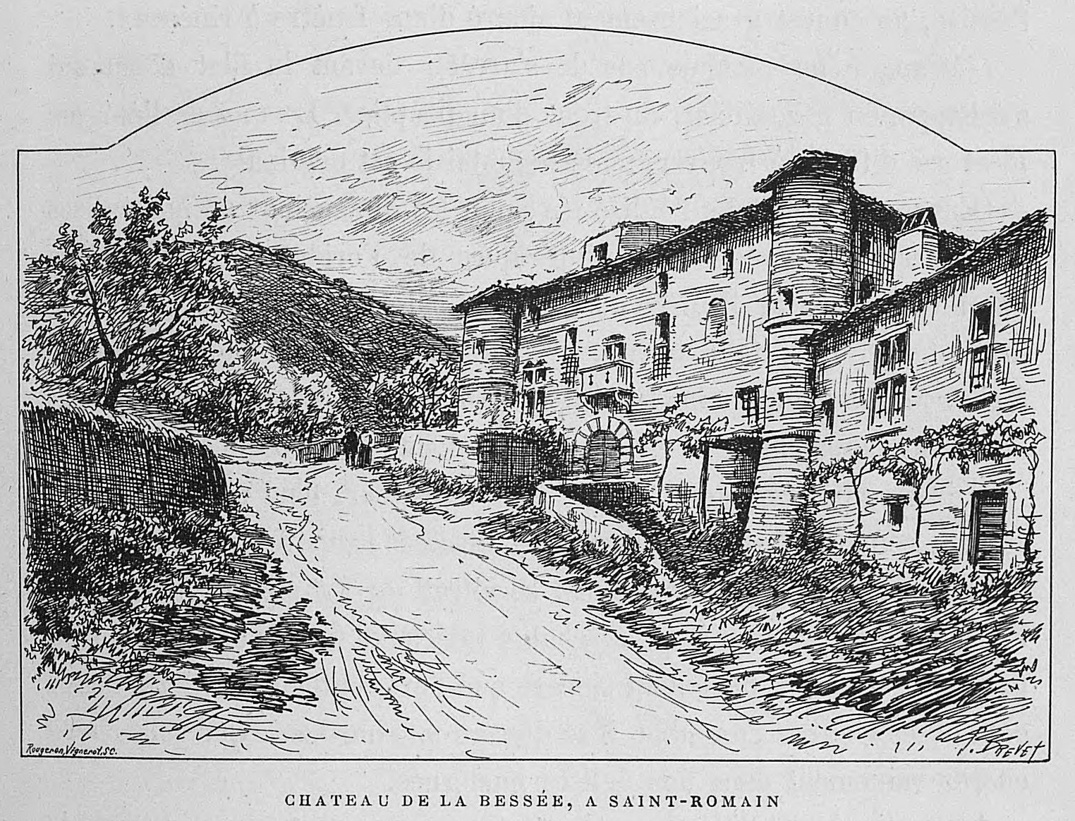 Aux environs de Lyon / Monsieur Josse ; préface de M. Coste-Labaume ; édition illustrée de 250 dessins de J. Drevet.